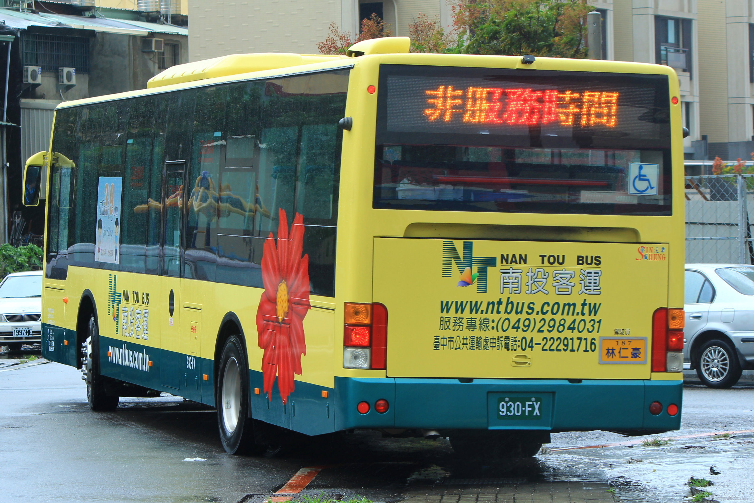 中文（台灣）: 金旅車尾照